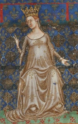 Beatrix Provensalská